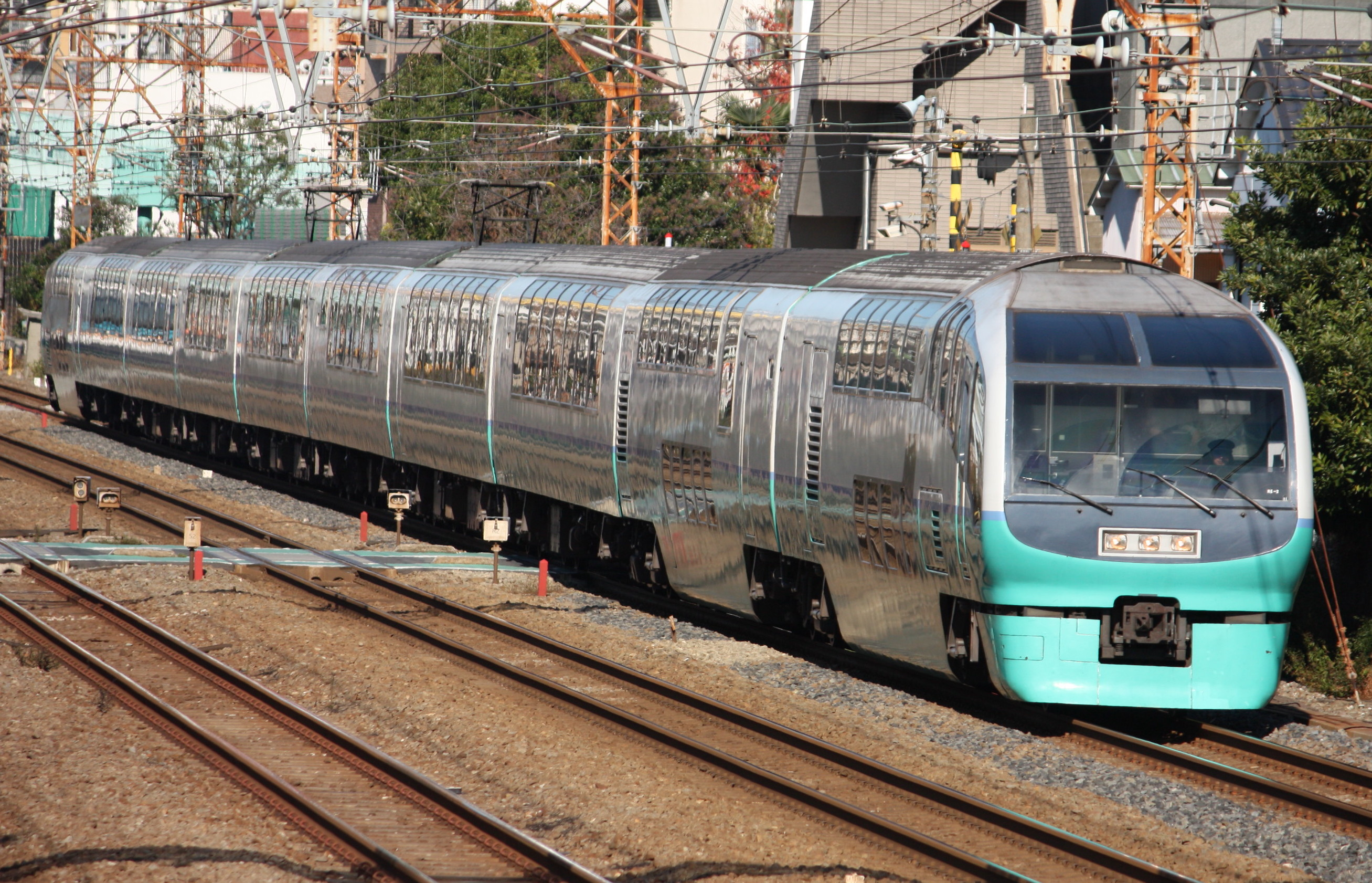 251系 スーパービュー踊り子 蒲田～川崎間にて